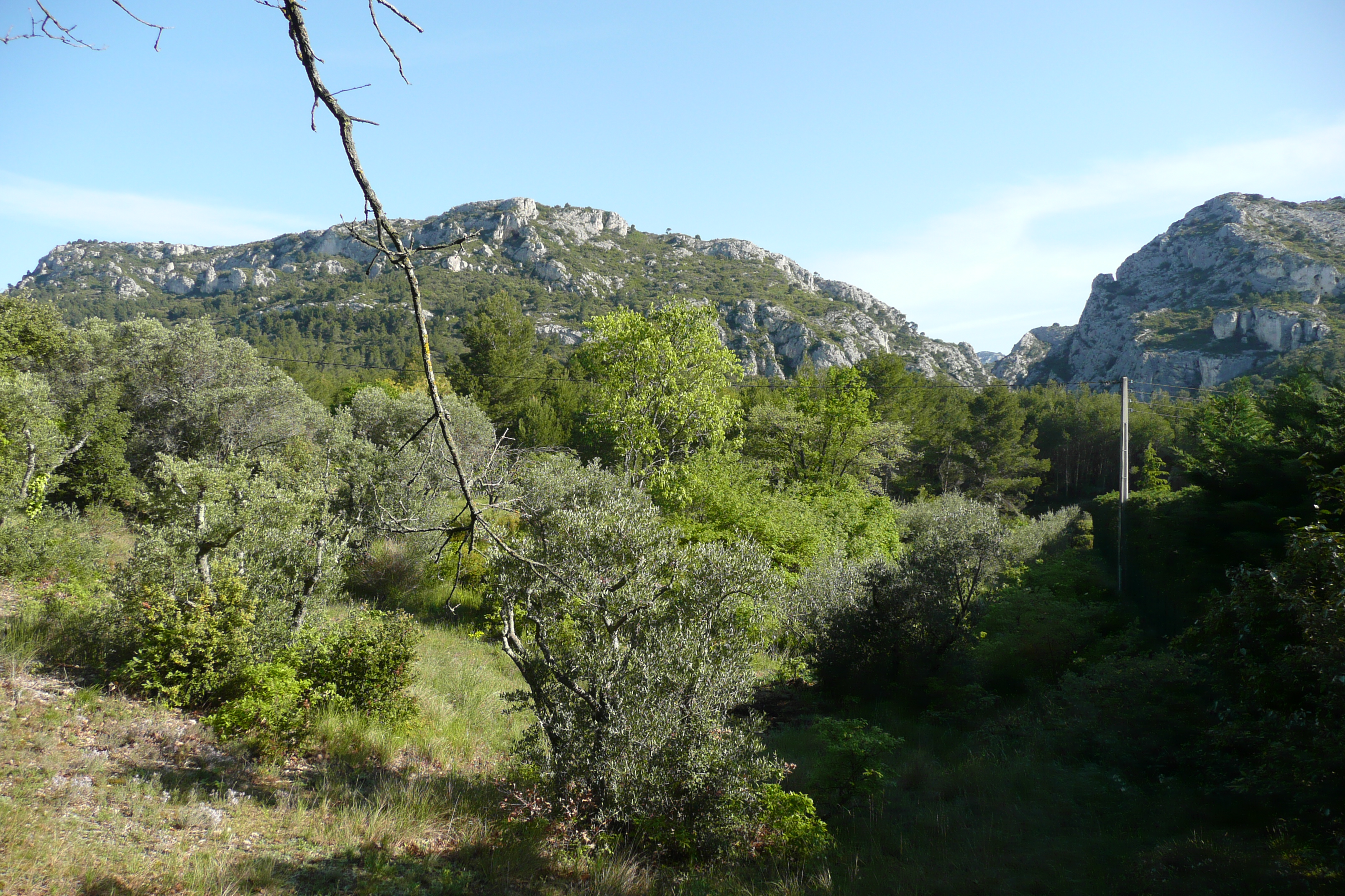 Les gorges de Régallon près Le Logis Neuf (Mérindol).